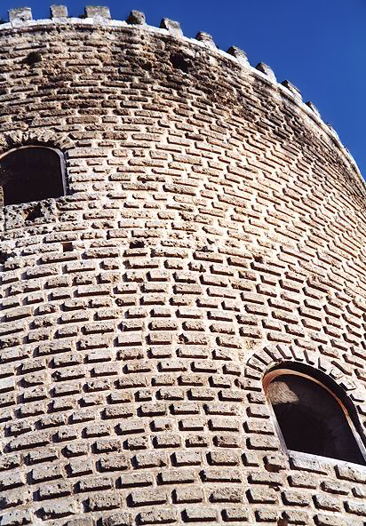 Tour ronde.